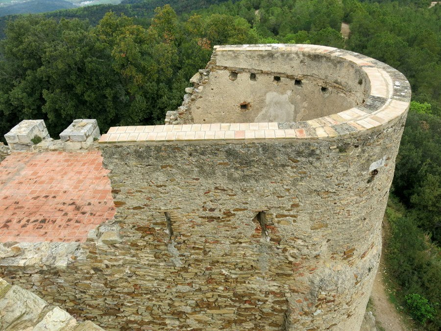 Castell de Sant Miquel, Celrà, comarca del Gironès - Catalunya